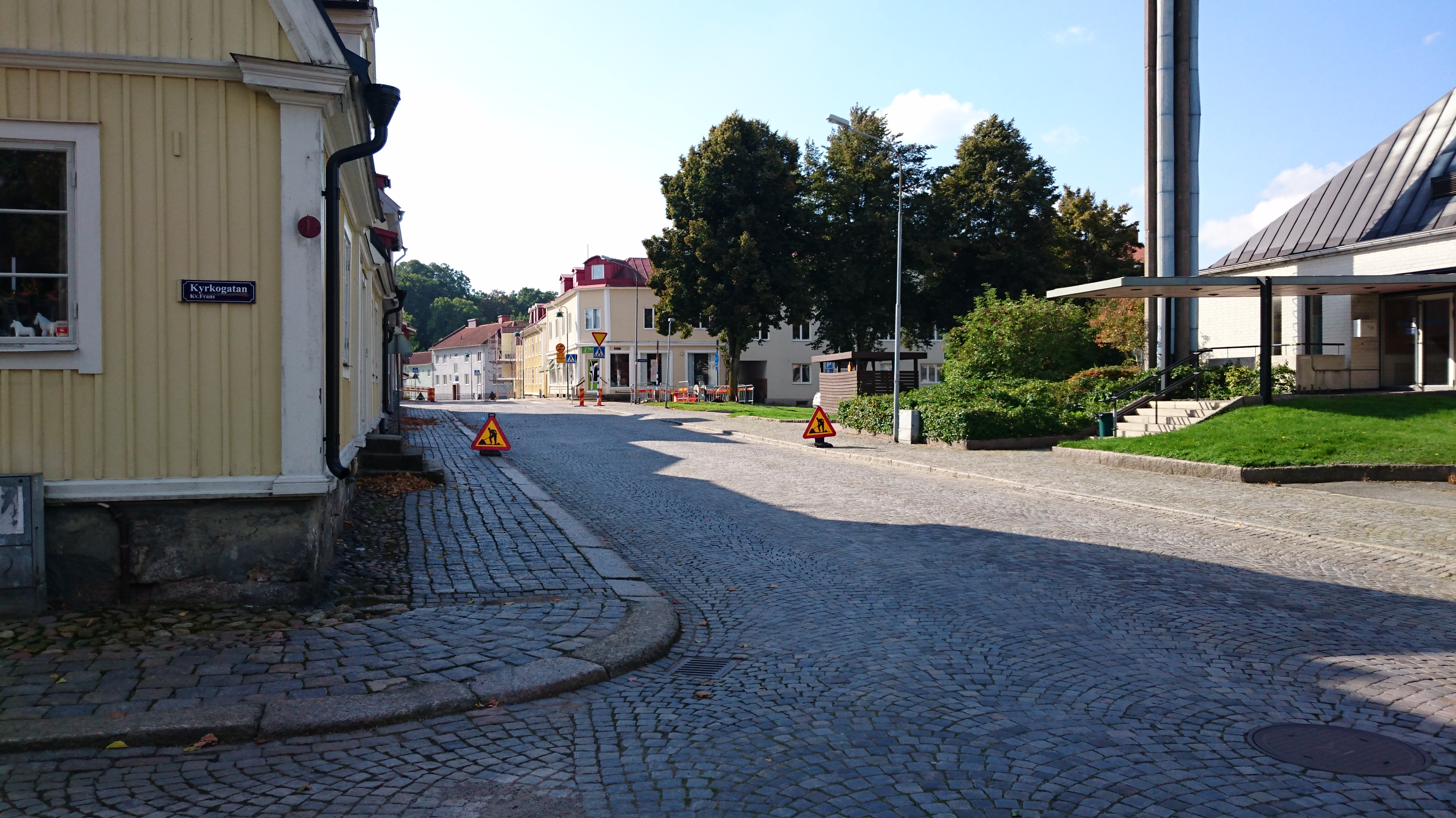 Rosengatan i Ronneby 2017 med kvarteret Bror och Kvarteret Carl i fonden.